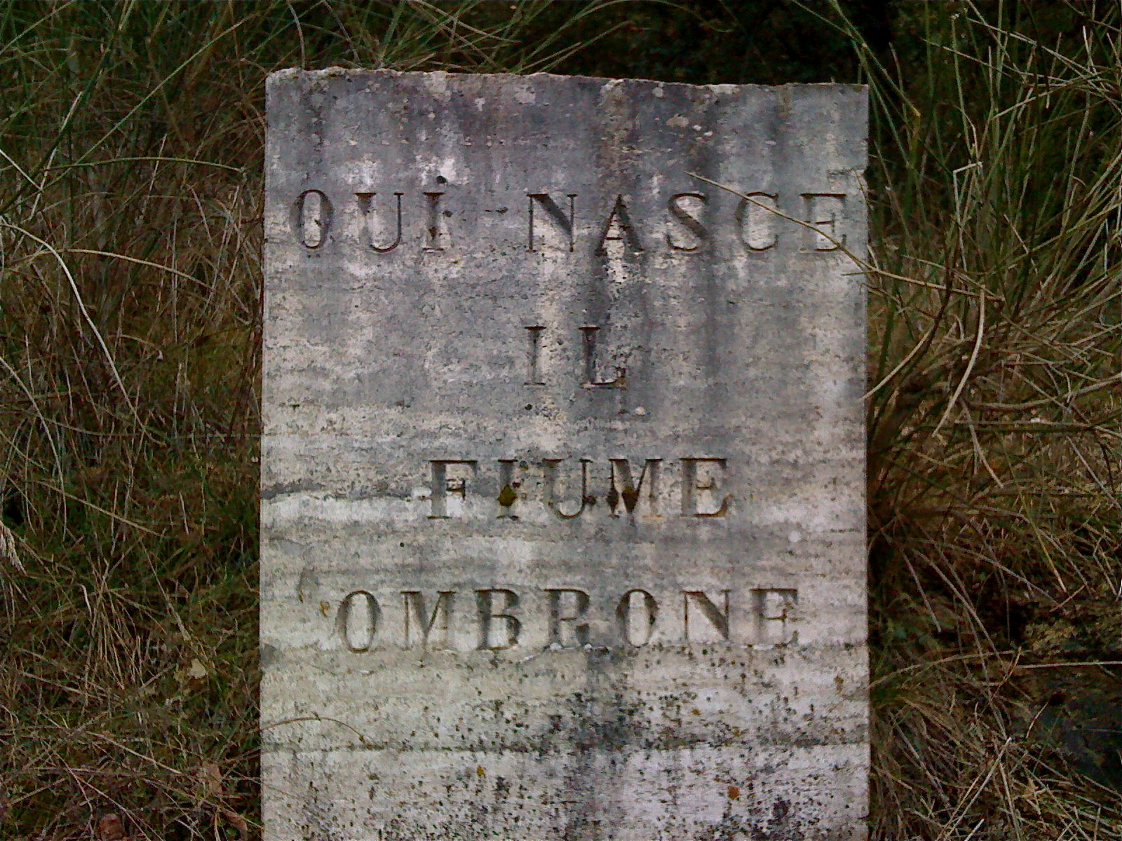 Cippo posto alla nascita del fiume Ombrone- San Gusmè- Siena